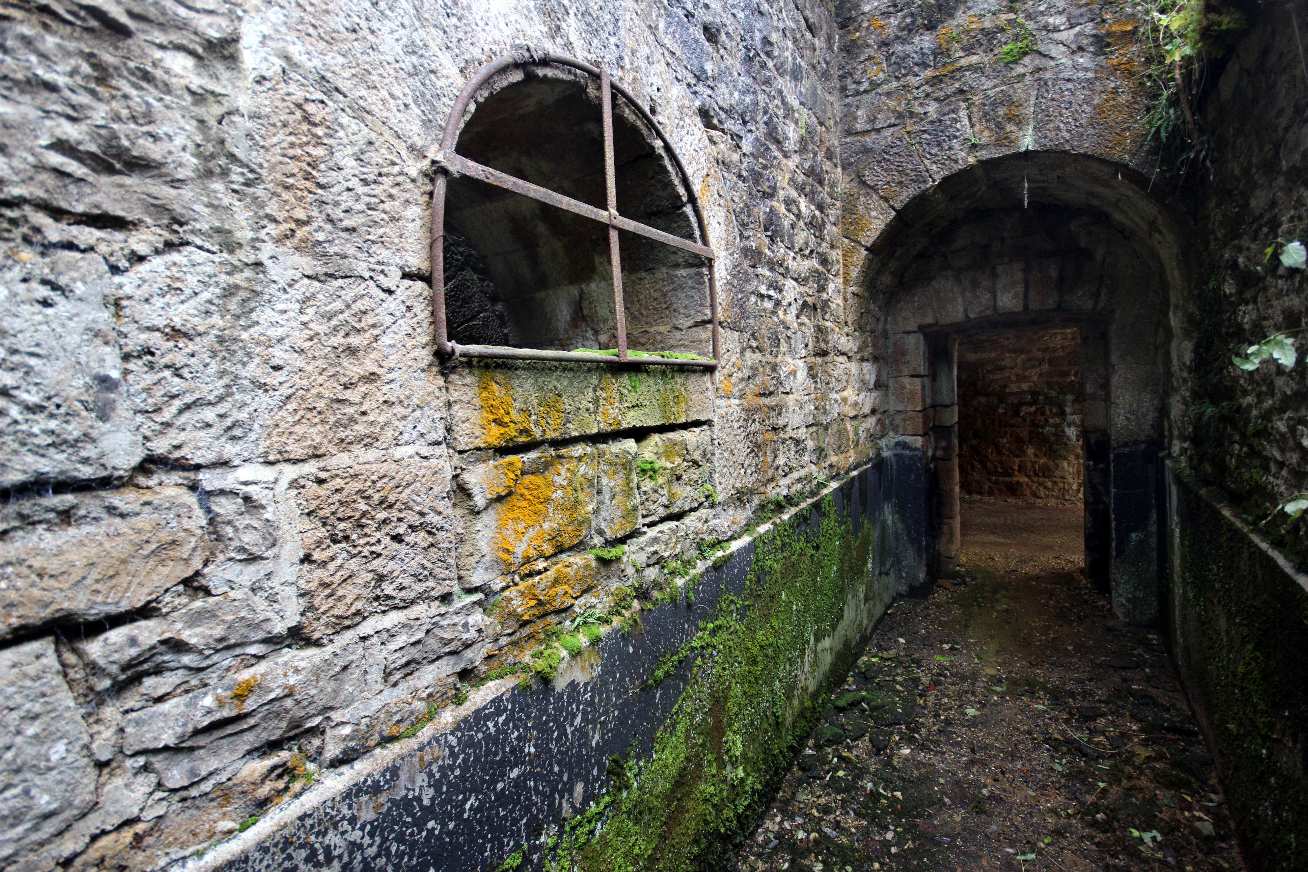 les latrines de guerre du fort de cognelot (2)